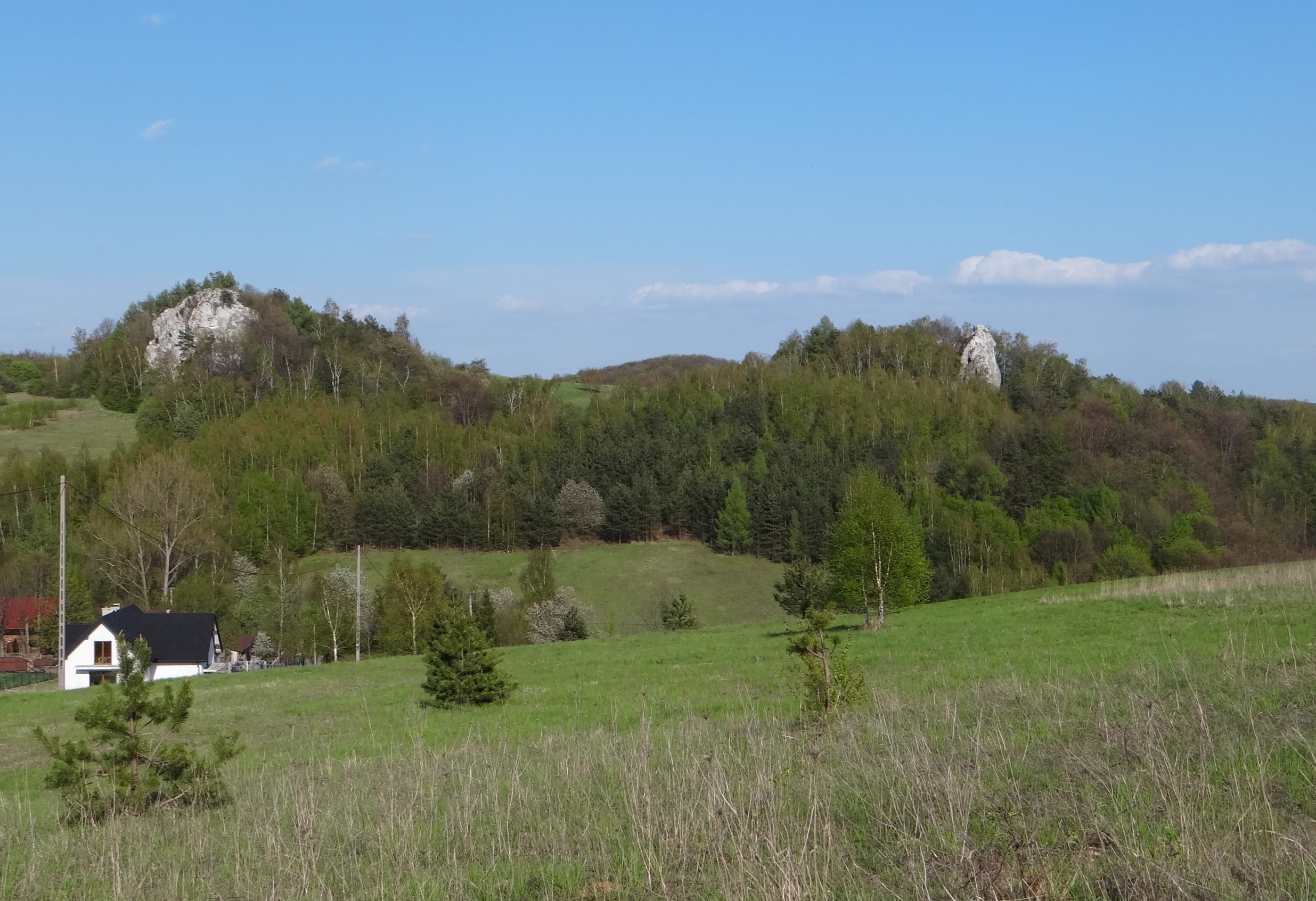 Witkowe Skały i Łyse Baszty w Dolinie Szklarki